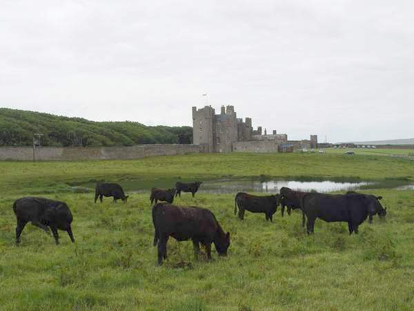 Castle of Mey